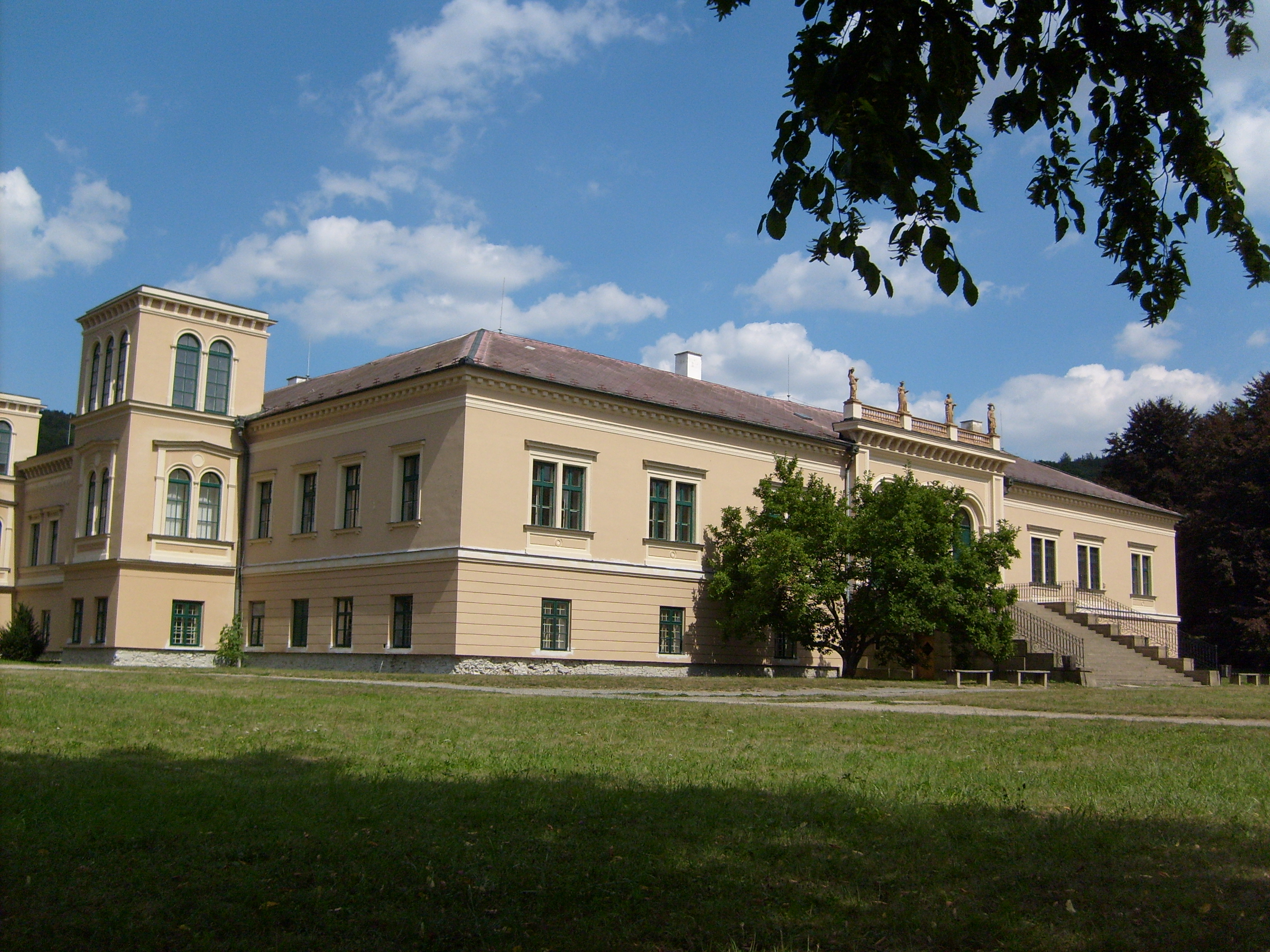 Zámek v Čechách pod Kosířem, okres Prostějov.